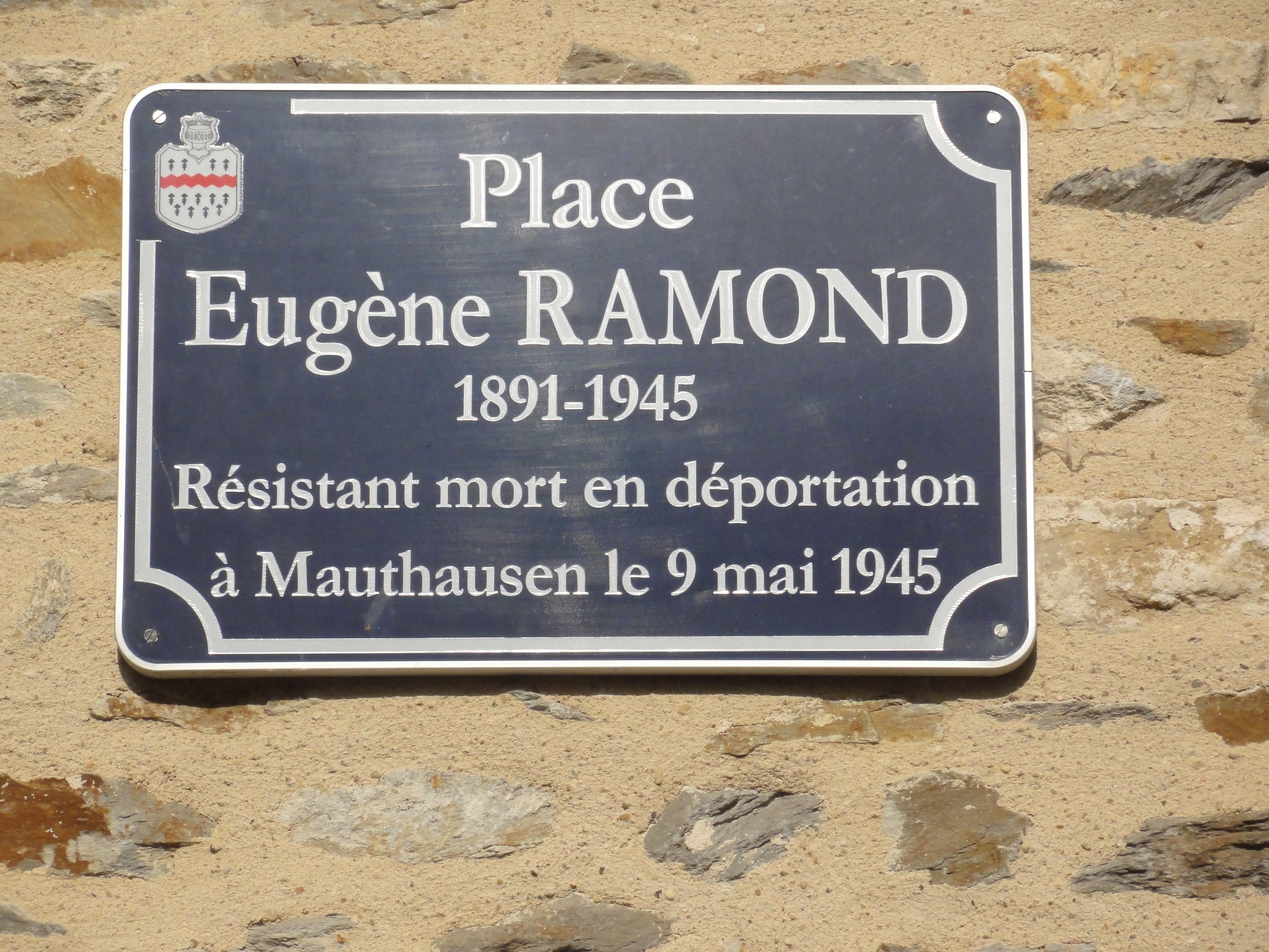 Gesnes-le-Gandelin (Sarthe) église (01) plaque Place Éugène Ramond, résistant